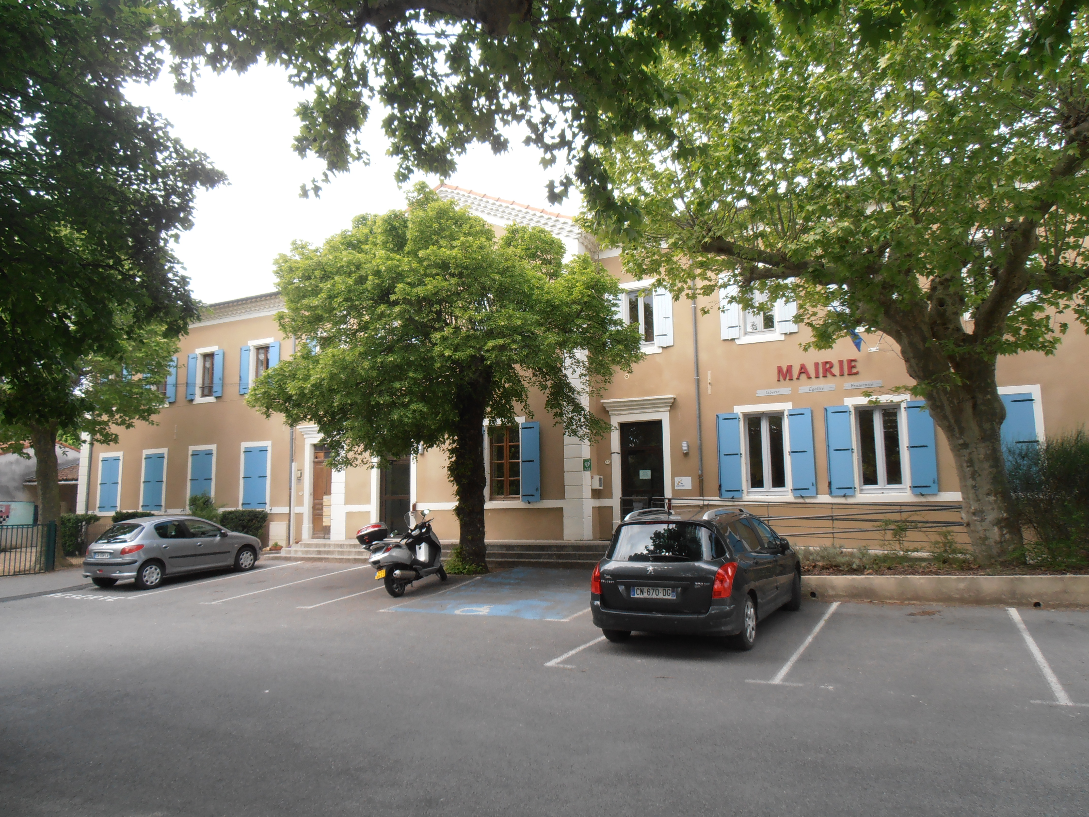 Ardèche, Salavas, Mairie et salle des fêtes. Les maquettes des 3 ponts de Salavas (1837-1922-1993) sont présentées dans le hall de la mairie, ainsi qu’une maquette rappelant l’architecture des églises de la Gleizasse avant leur destruction.